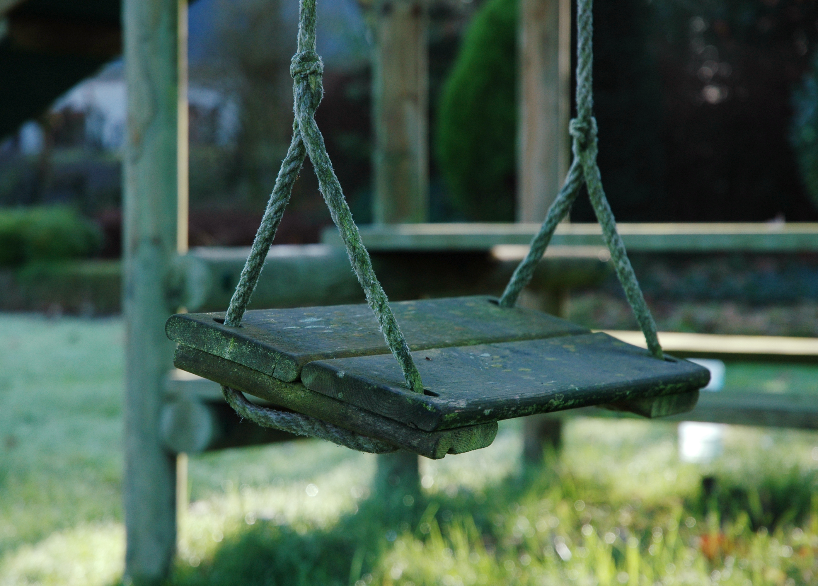 Een schommel; (en) A swing